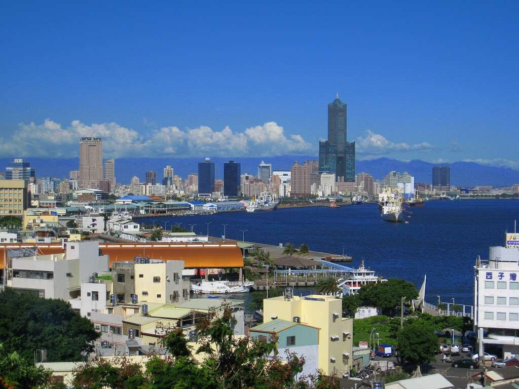 英國領事館上面拍攝高雄港Kaohsiung Port